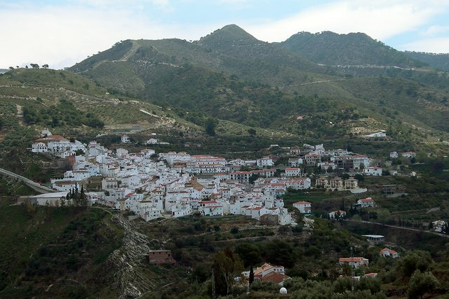 Vista de Canillas de Albaida.